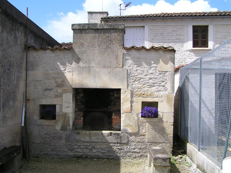 four à pain du Palain à Cherves-Richemont